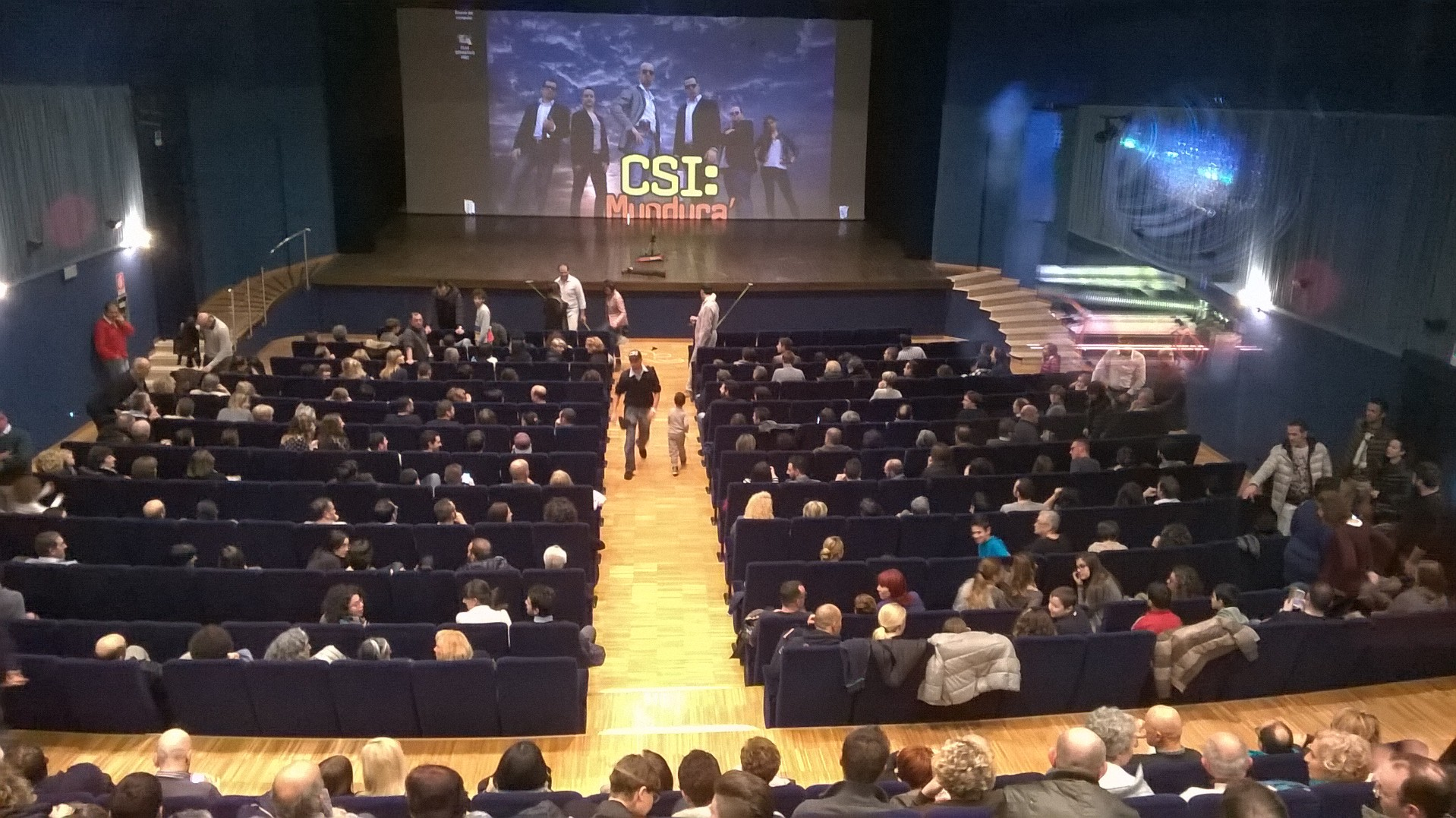 CSI Mundurà, il film prodotto dalla Pa.St. Entertainment